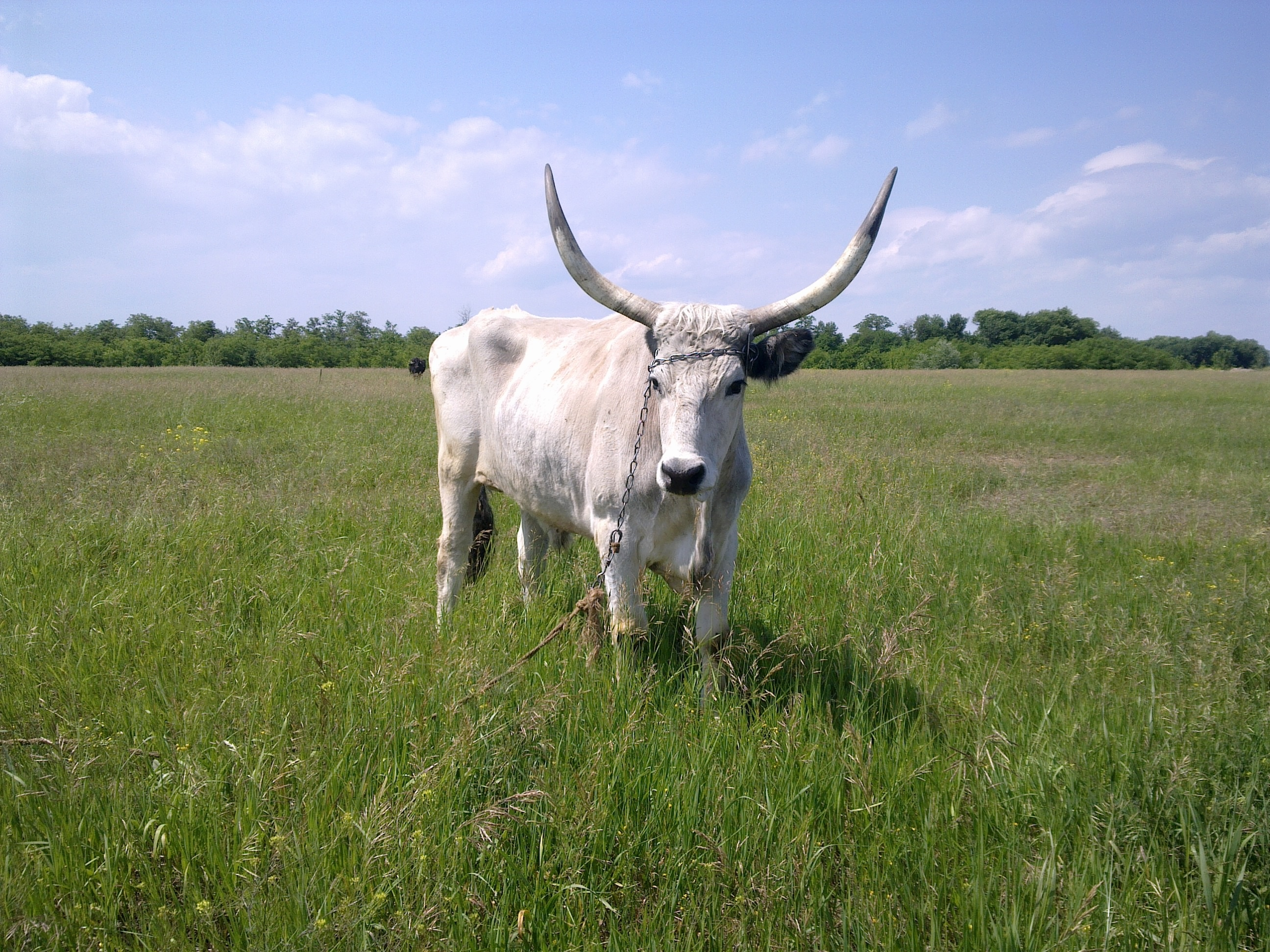 рідкісна сіро-українська порода волів в заповіднику "Козацькі землі України"